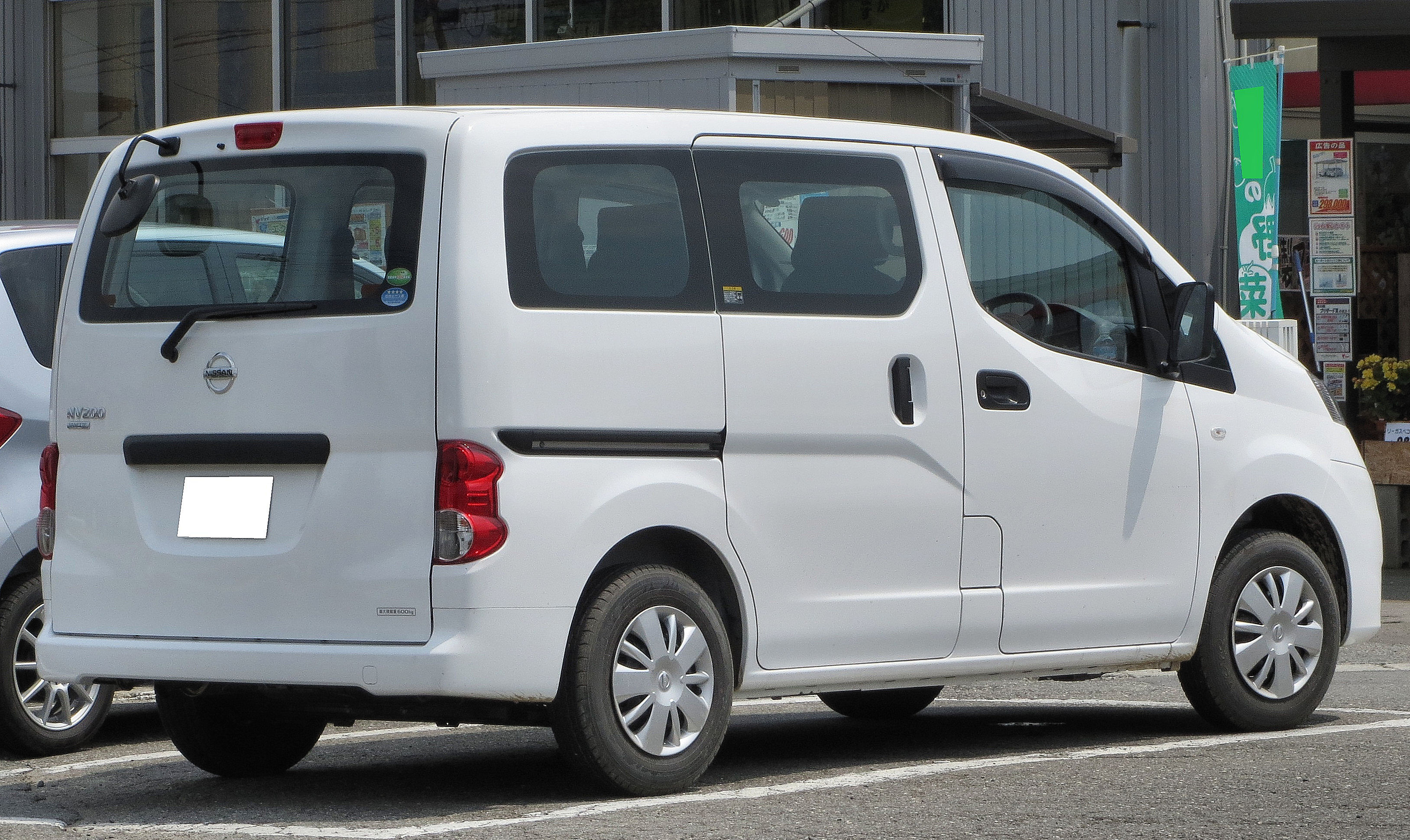 日産 NV200バネット バンVX